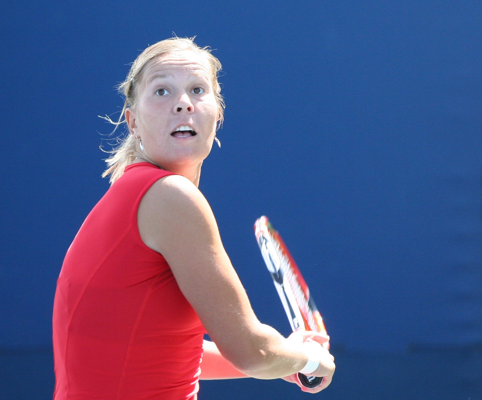 Portrait de Hradecká à l'US Open 2009